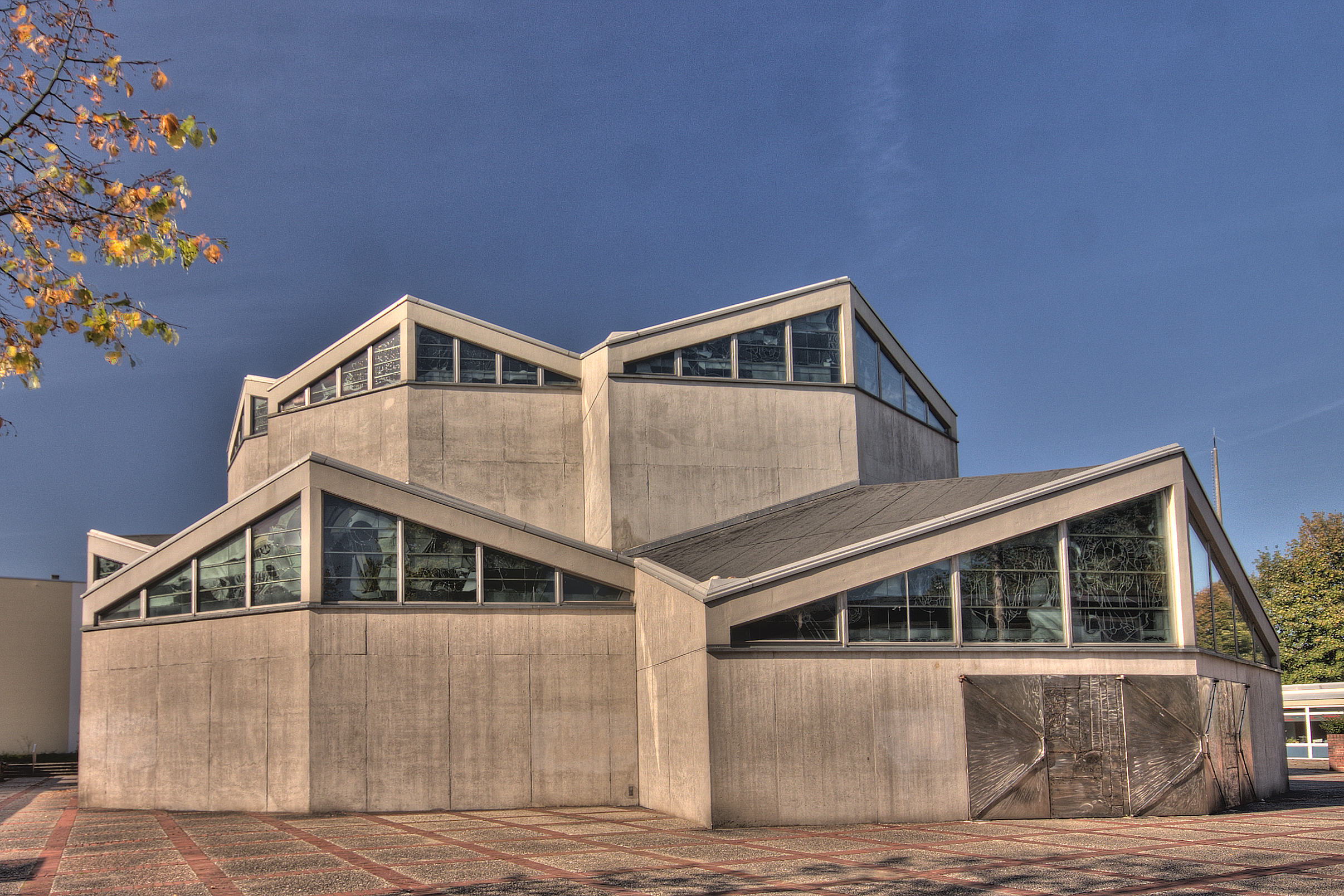 Kath. St. Norbert-Kirche in Düsseldorf-Garath